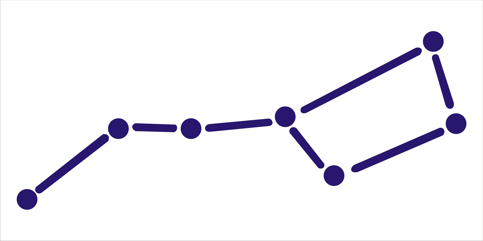 സപ്തർഷിമണ്ഡലത്തിന്റെ ഘടന